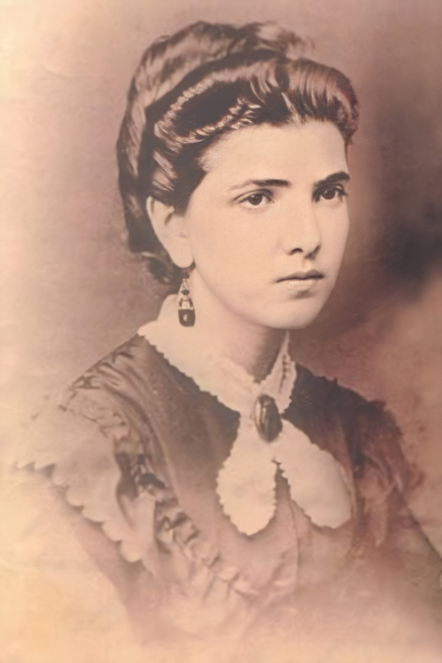 Carmela Carvajal Briones (1851 - 1931), viuda del héroe naval chileno Arturo Prat Chacón.